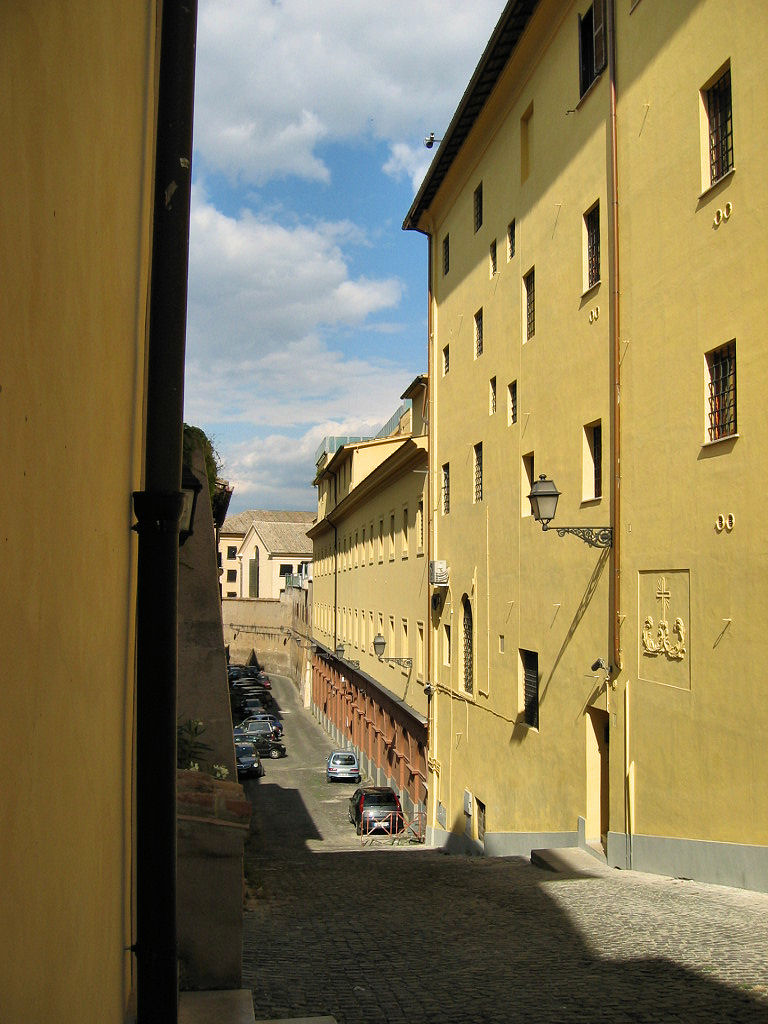 Carcere di Regina Coeli, Roma, lato via delle Mantellate. Picture by Torvindus.